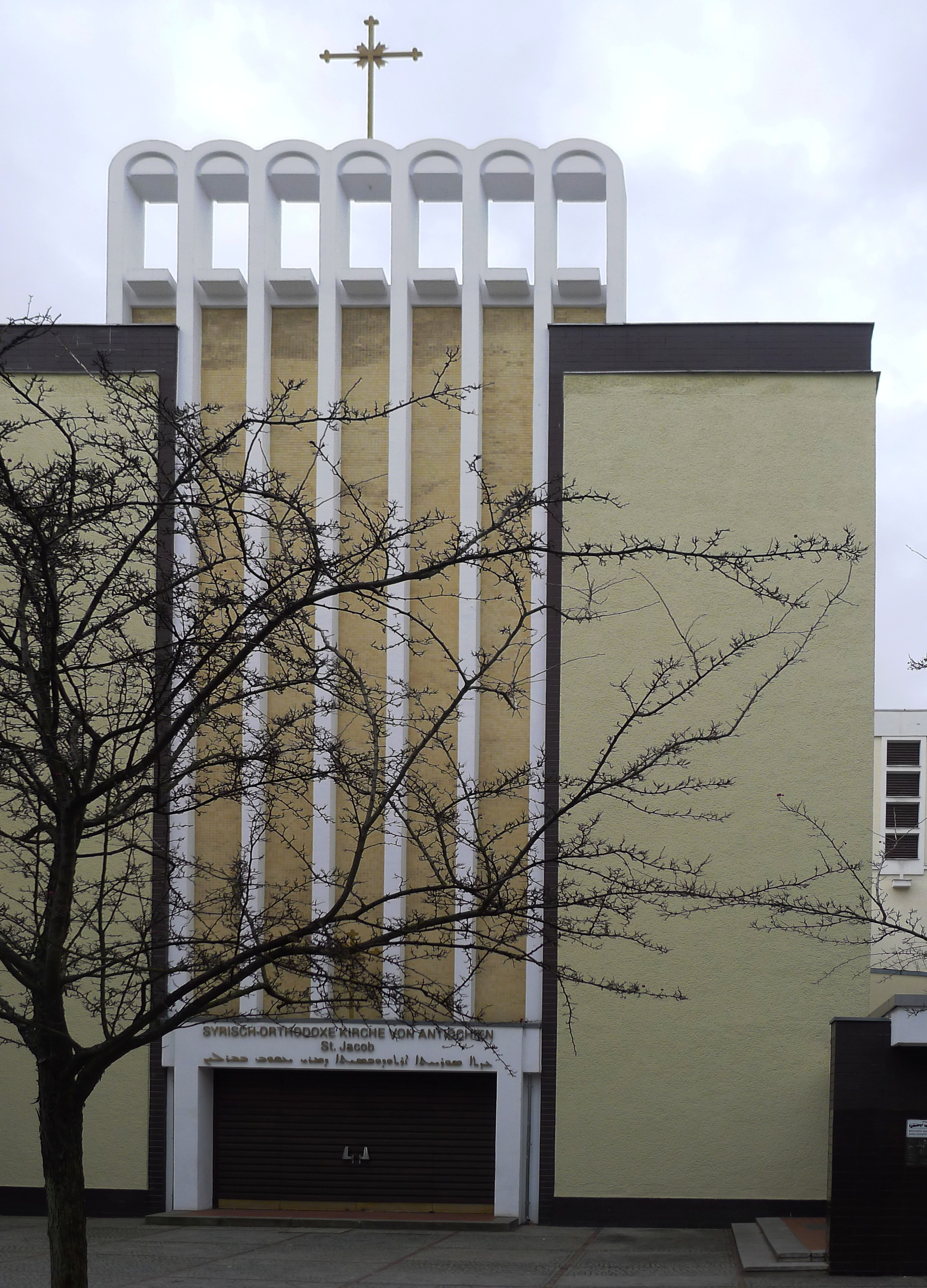 Portal von der Straße aus gesehen, im Hintergrund ganz rechts der Glockenturm